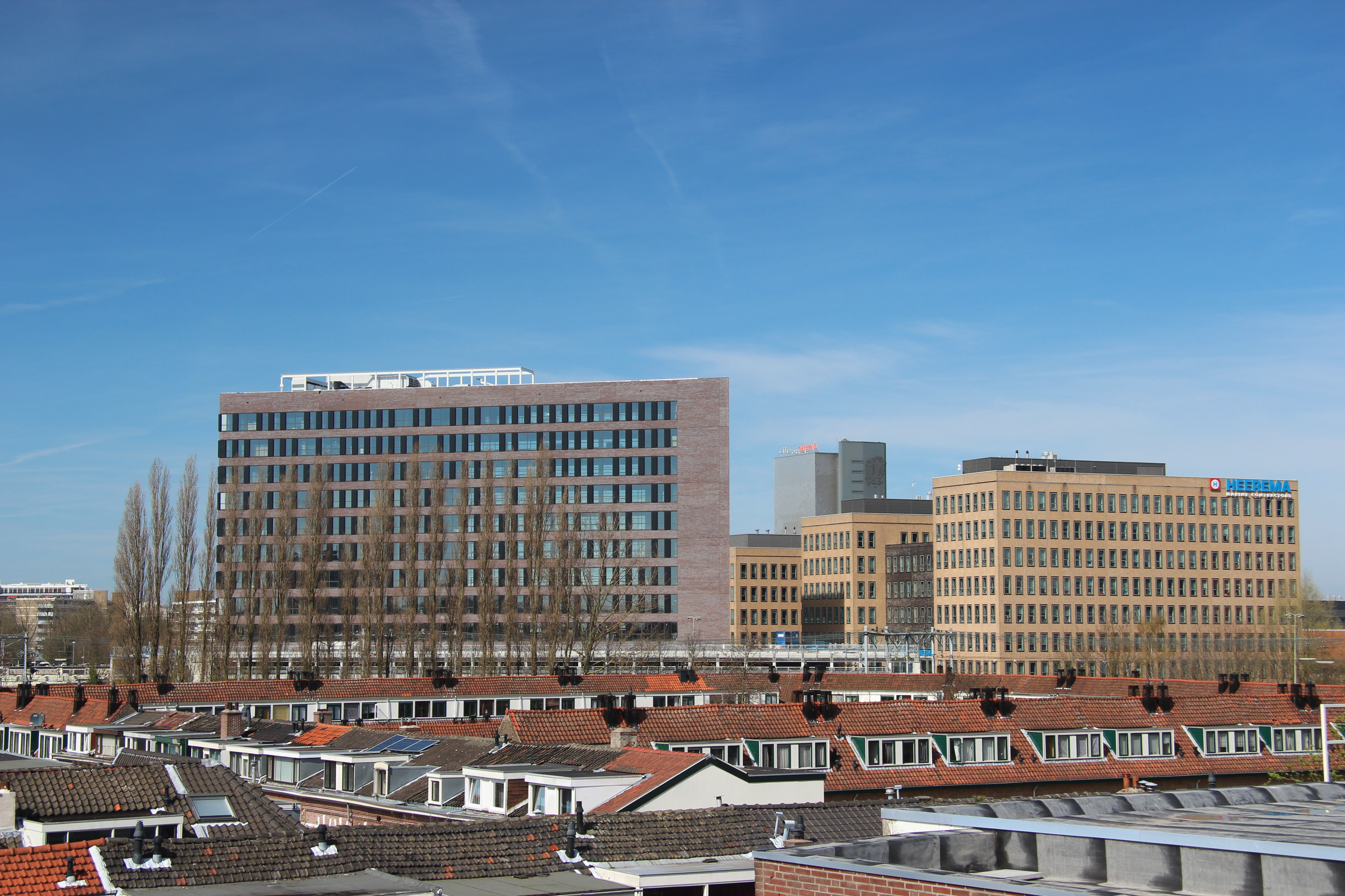 Head Office Heerema Marine Contractors Nederland SE, Vondellaan 55, 2332 AA Leiden, The Netherlands